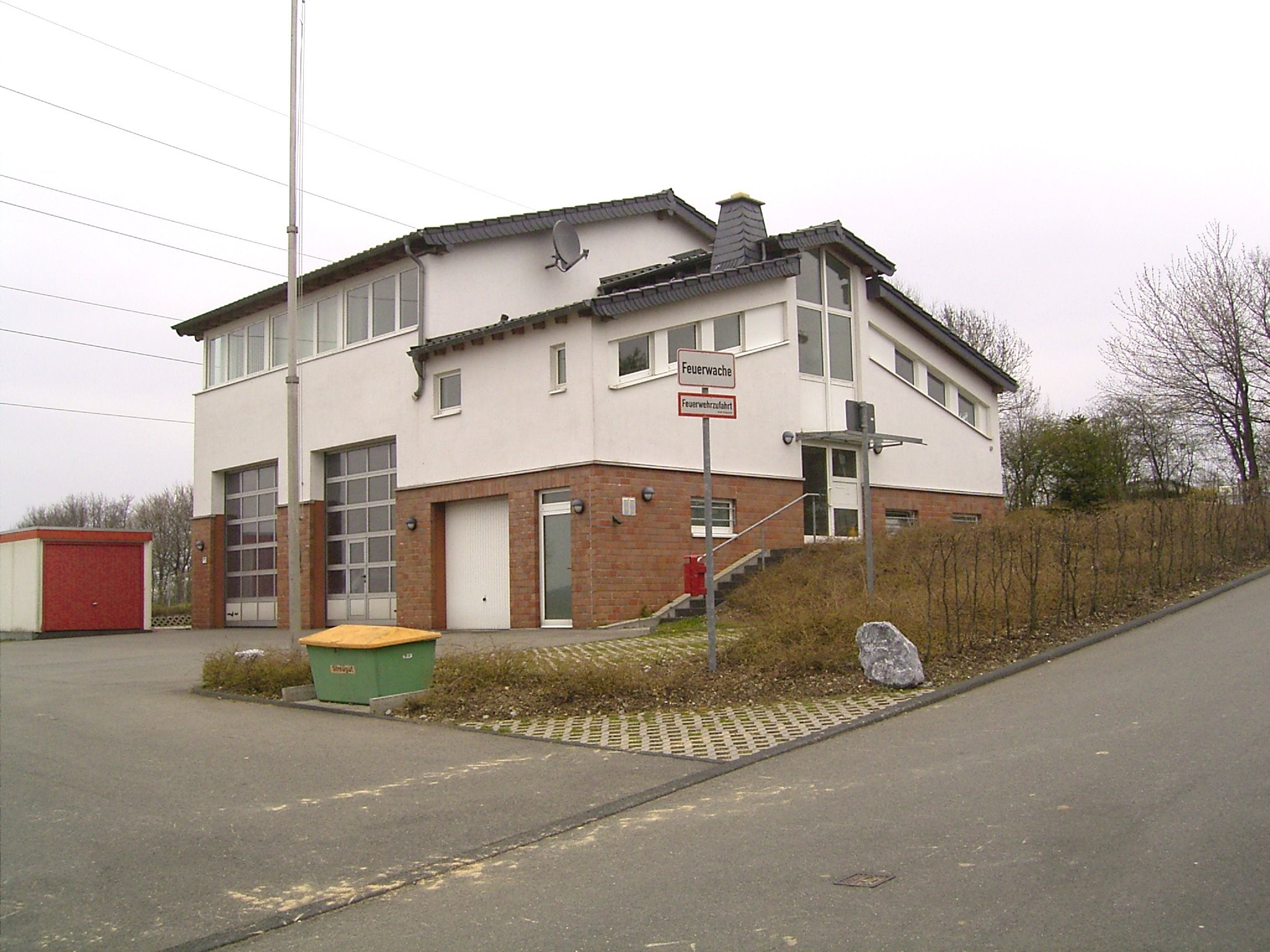 Wuppertal-Ronsdorf: Feuerwache Linde